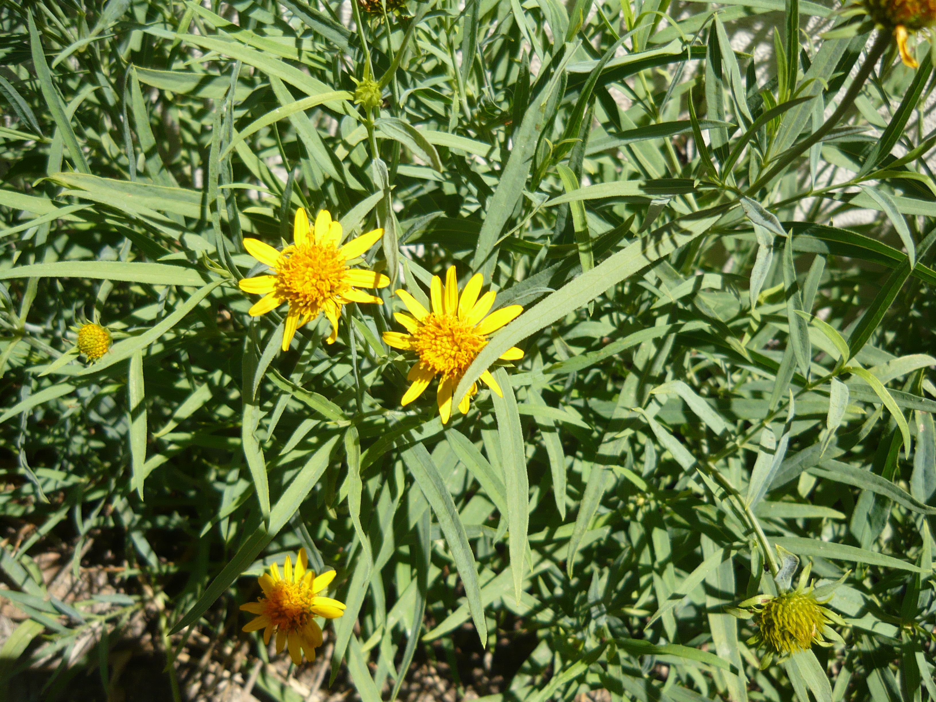 Wedelia glauca (=Pascalia glauca), subespontánea. Real Jardín Botánico de Madrid.